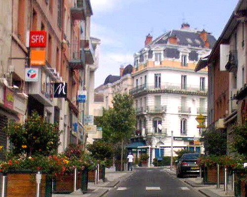 Centre Ville Oyonnax